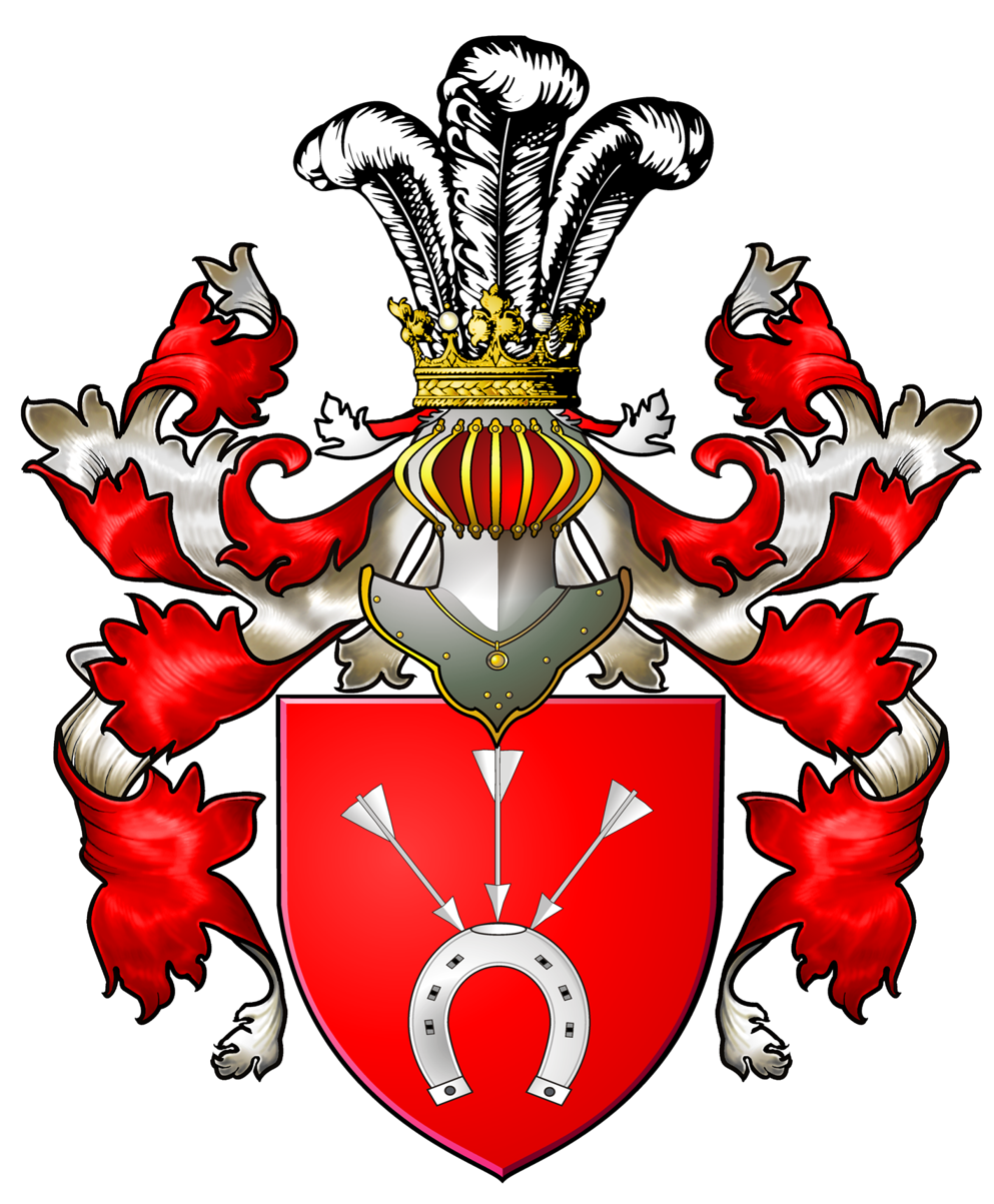 Polski herb szlachecki Narutowicz